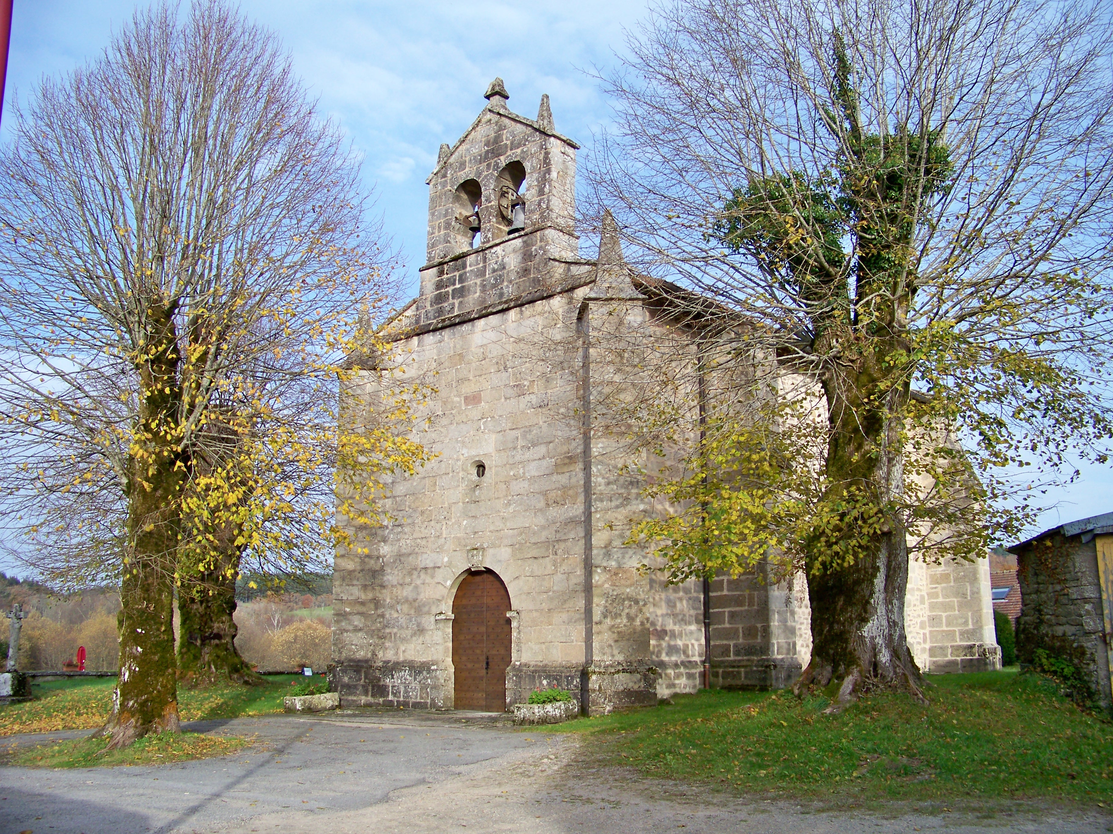 église du Compeix